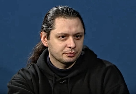 Михаил Елизаров — русский писатель и автор-исполнитель